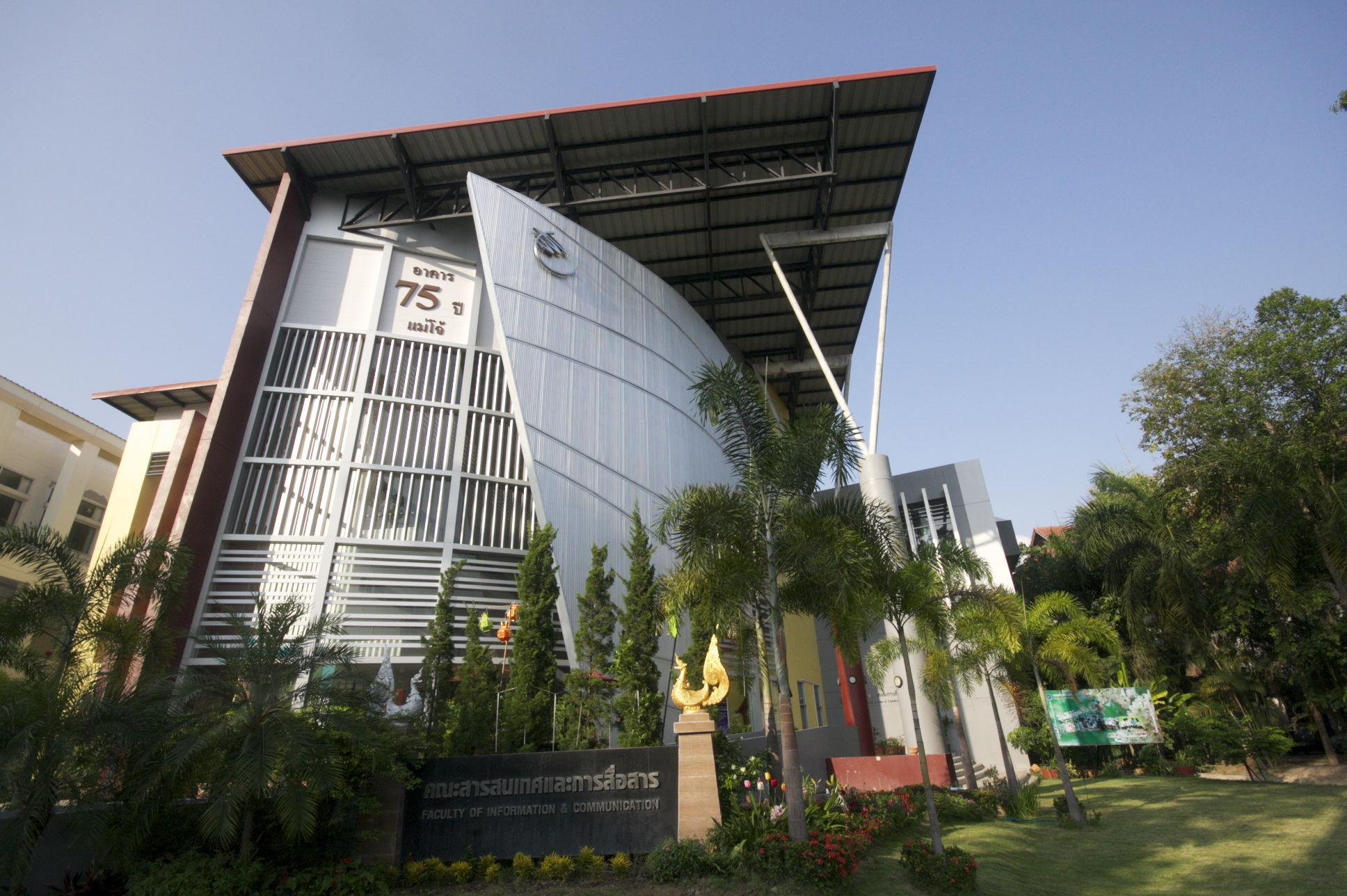 หน้าคณะ